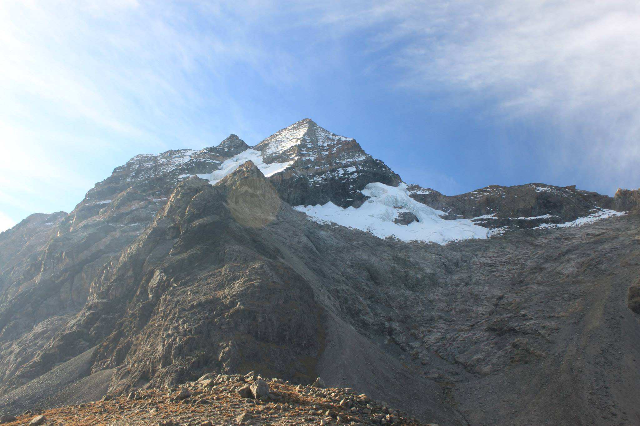 Lo que antes enseñaban que la Nieve era Perpetua, ahora es una preocupación EL DESHIELO DE LA SIERRA NEVADA DE SANTA MARTA.